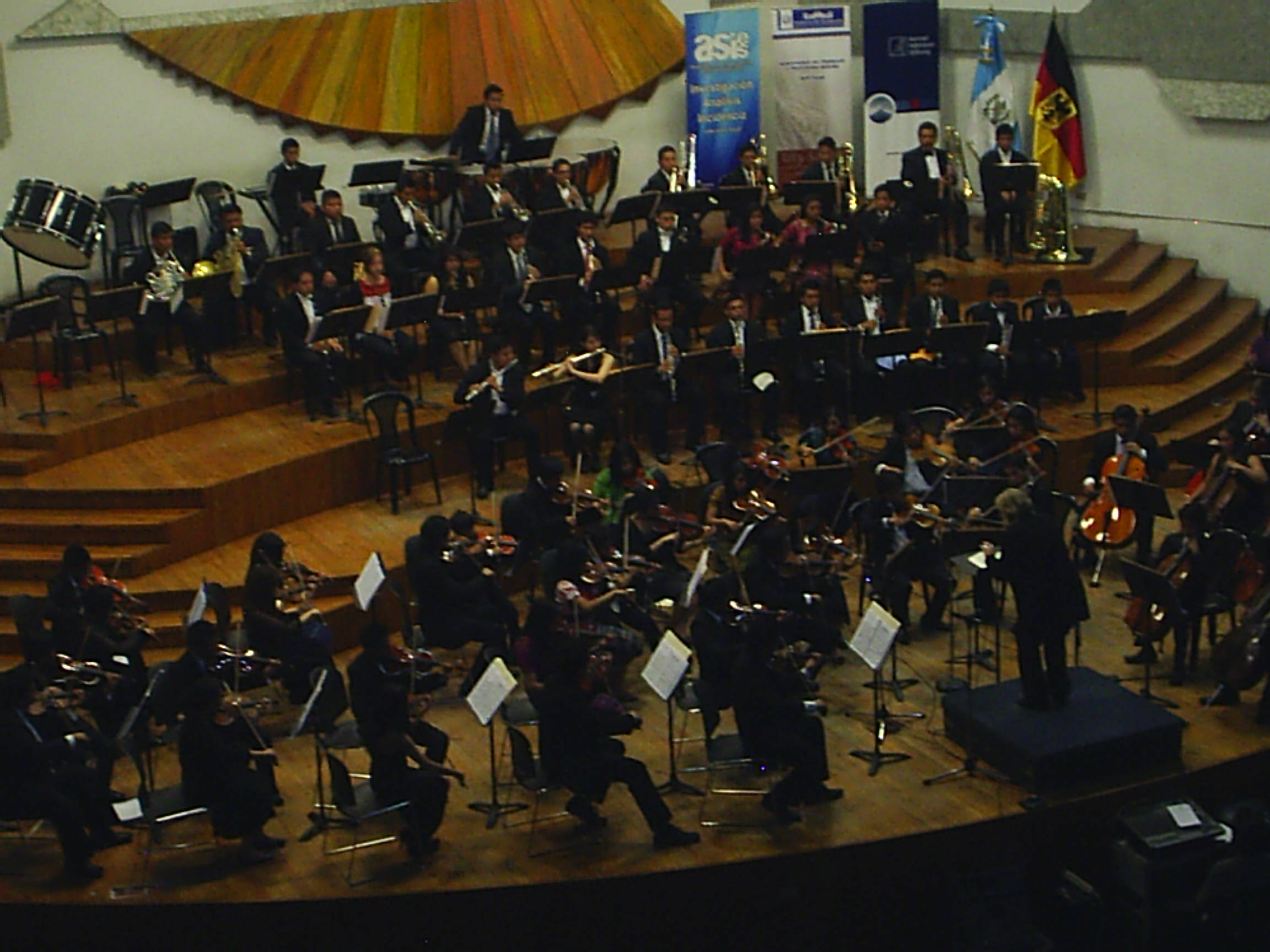 La ONJI pretende fomentar y promover la capacitación musical de los jóvenes que la integran. Para el efecto, contempla realizar tres talleres por año, de 2014 a 2016. Cada campamento concluirá con conciertos para demostrar los avances alcanzados. En la foto, el segundo de los recitales realizado en el Conservatorio Nacional de Música de Guatemala, después del primero de los campamentos que tuvo lugar en Panajachel, Sololá, del 11 al 21 de marzo de 2014.